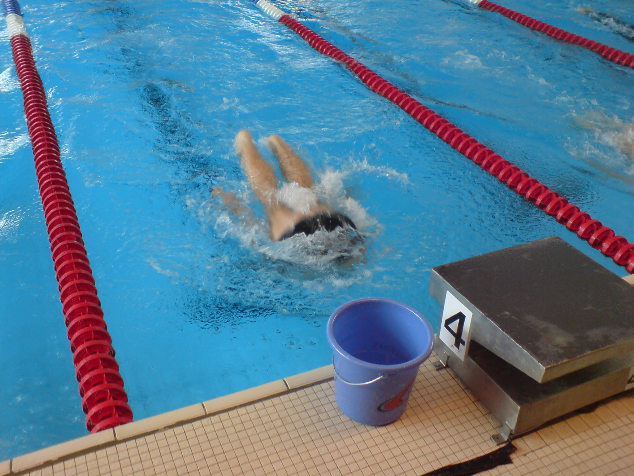 Ein Schwimmer bei der Wende. Aufgenommen während der Deutschen Hochschulmeisterschaften Schwimmen 2007, 11.-13. Mai in Hamburg, Alsterschwimmhalle.